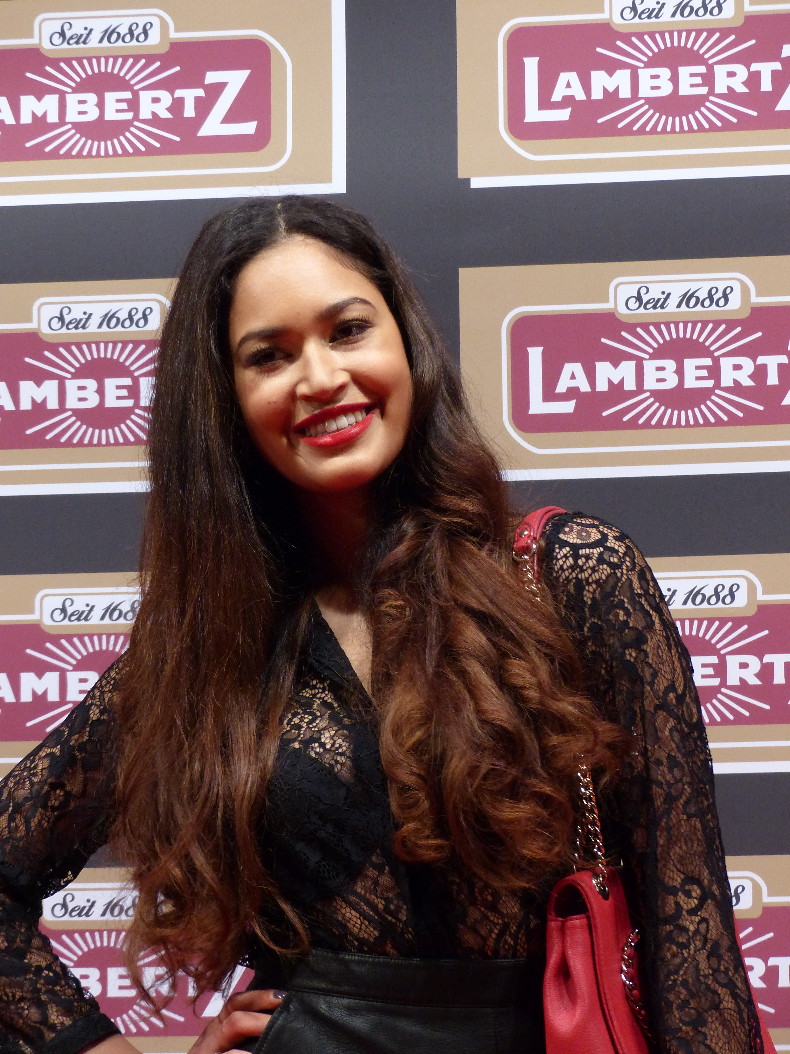 Lovelyn Enebechi bei der Lambertz Monday Night, im Februar 2016.